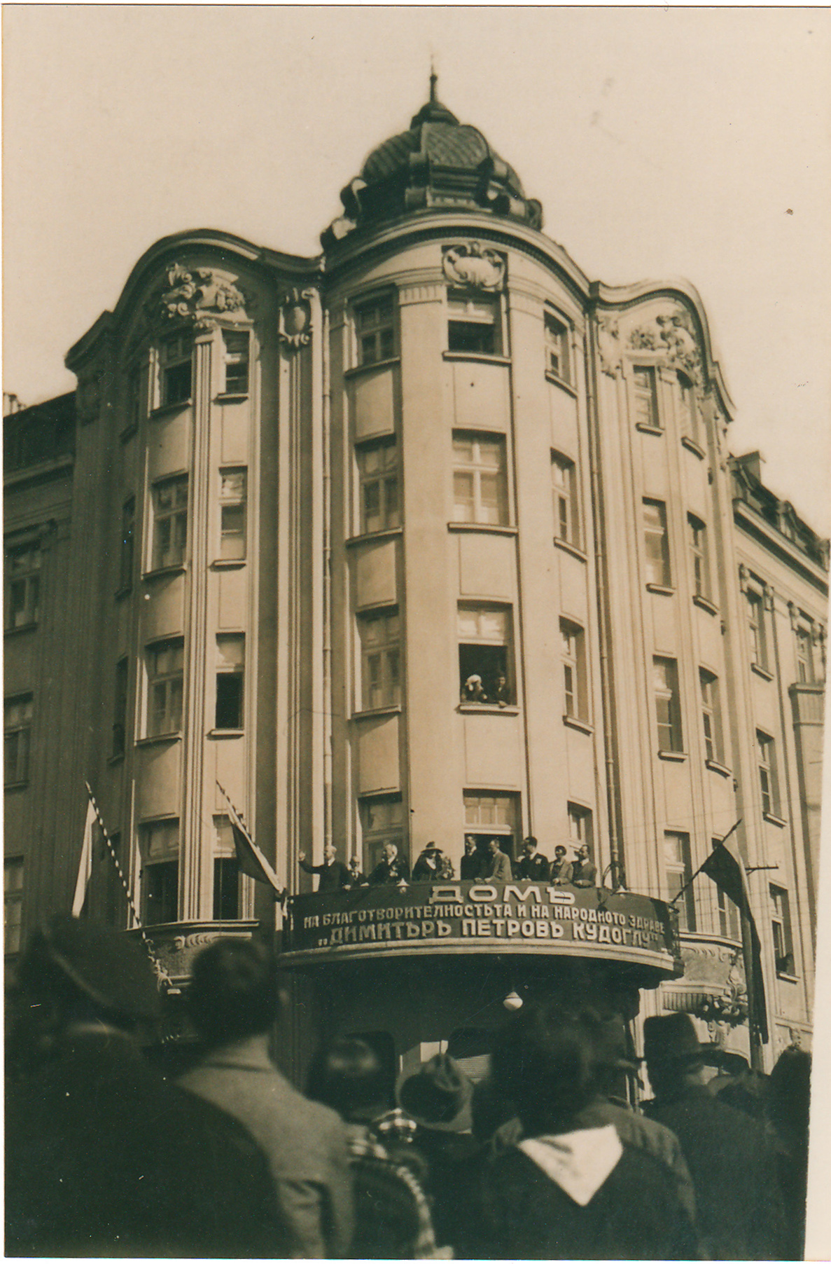 Дом за благотворителност и народно здраве Кудокглу